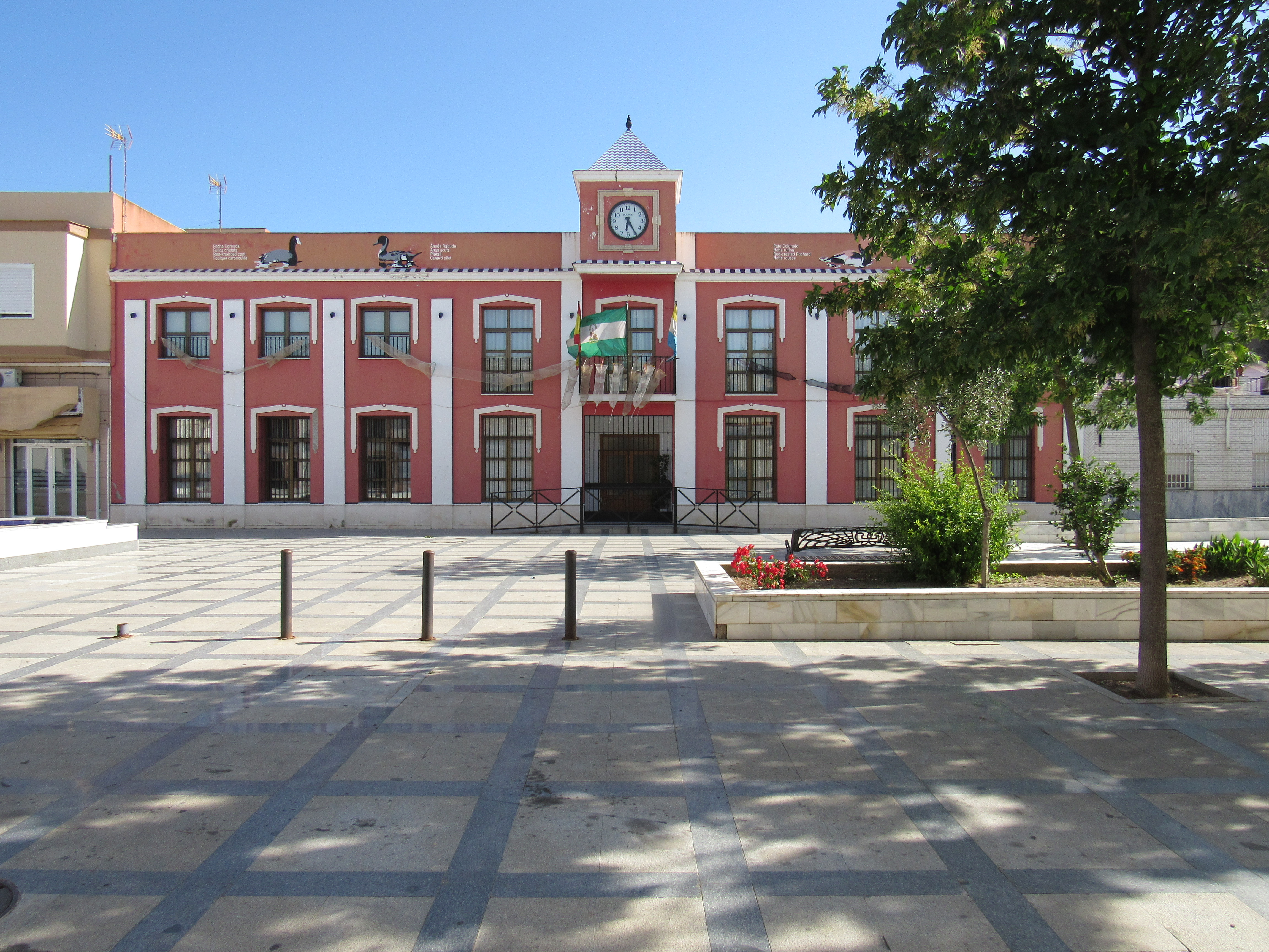 Ayuntamiento de Isla Mayor, provincia de Sevilla, Andalucía, España.